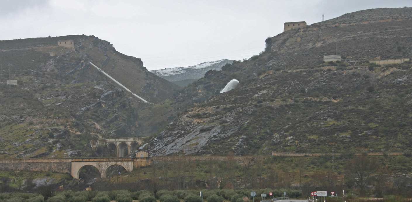 Barranco de las Cuevas. Canales del Jarama, y de El Atazar (sifones) y Canal de la Parra con pequeño acueducto.